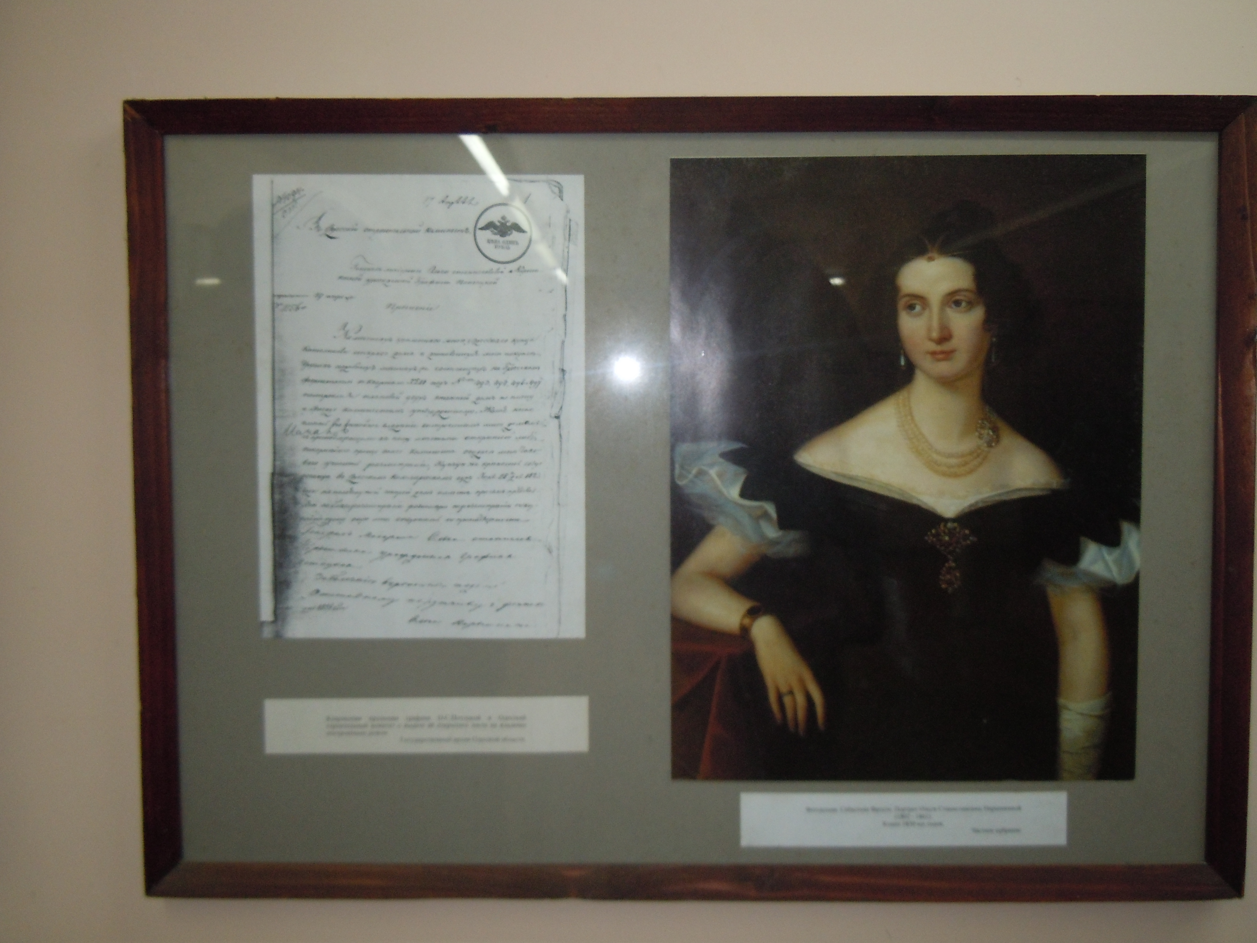 Портрет Ольги Потоцької-Наришкіної. Одеський художній музей